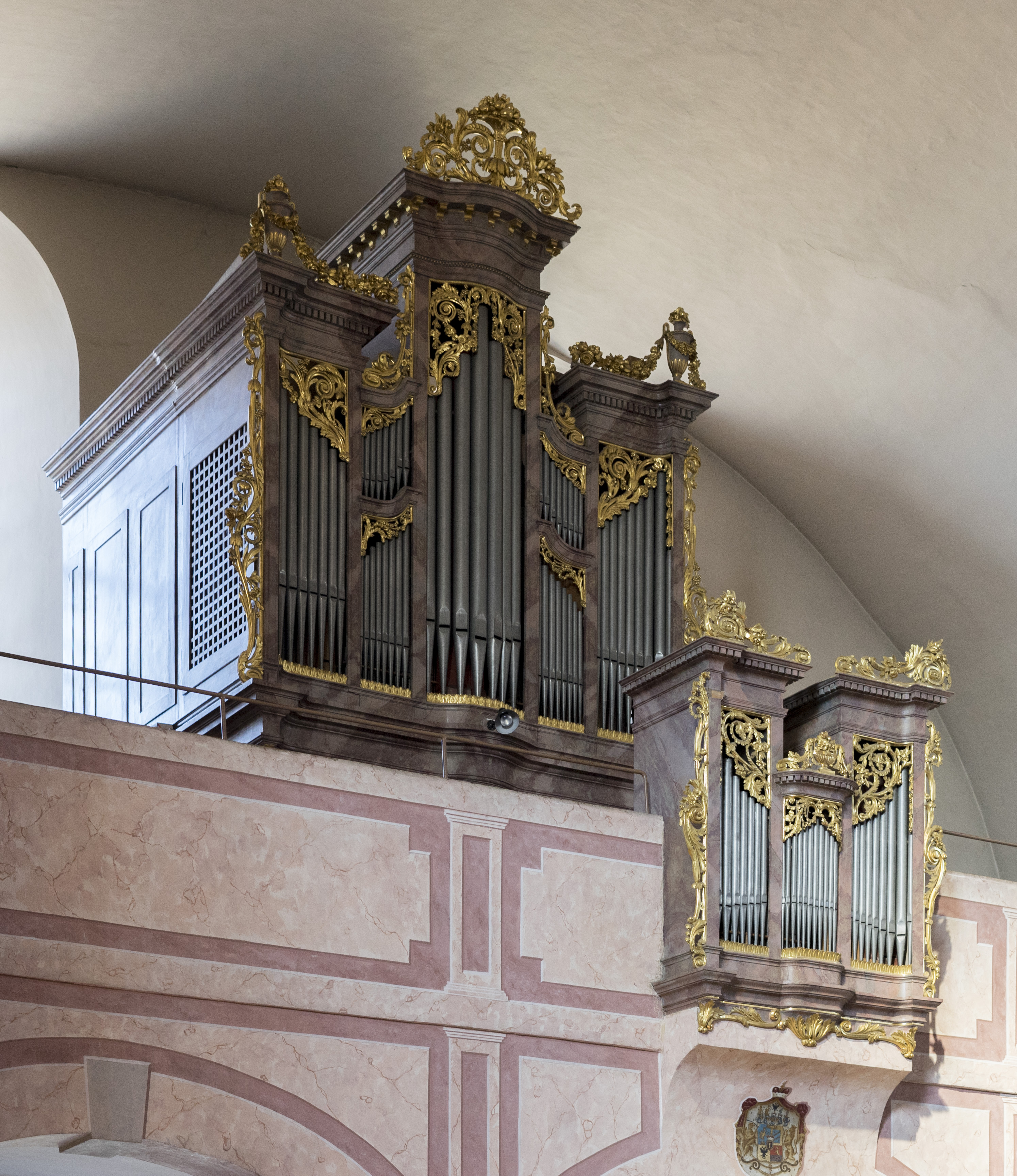 Bergkirche Heimsuchung Mariae. Haydn-Orgel